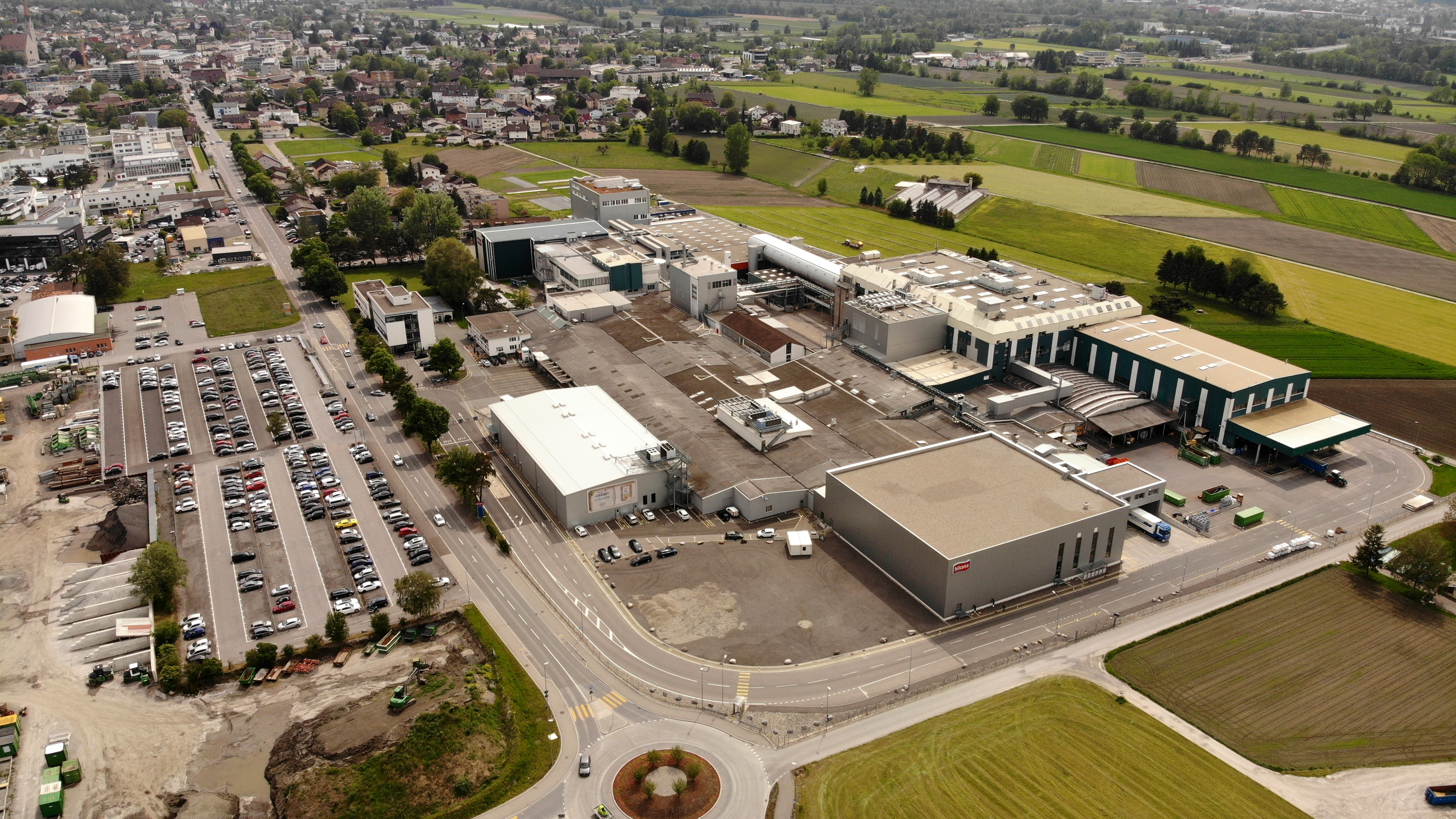 Drohnen-Foto des Werks und Hauptsitzes der Hilcona AG in Schaan, FL